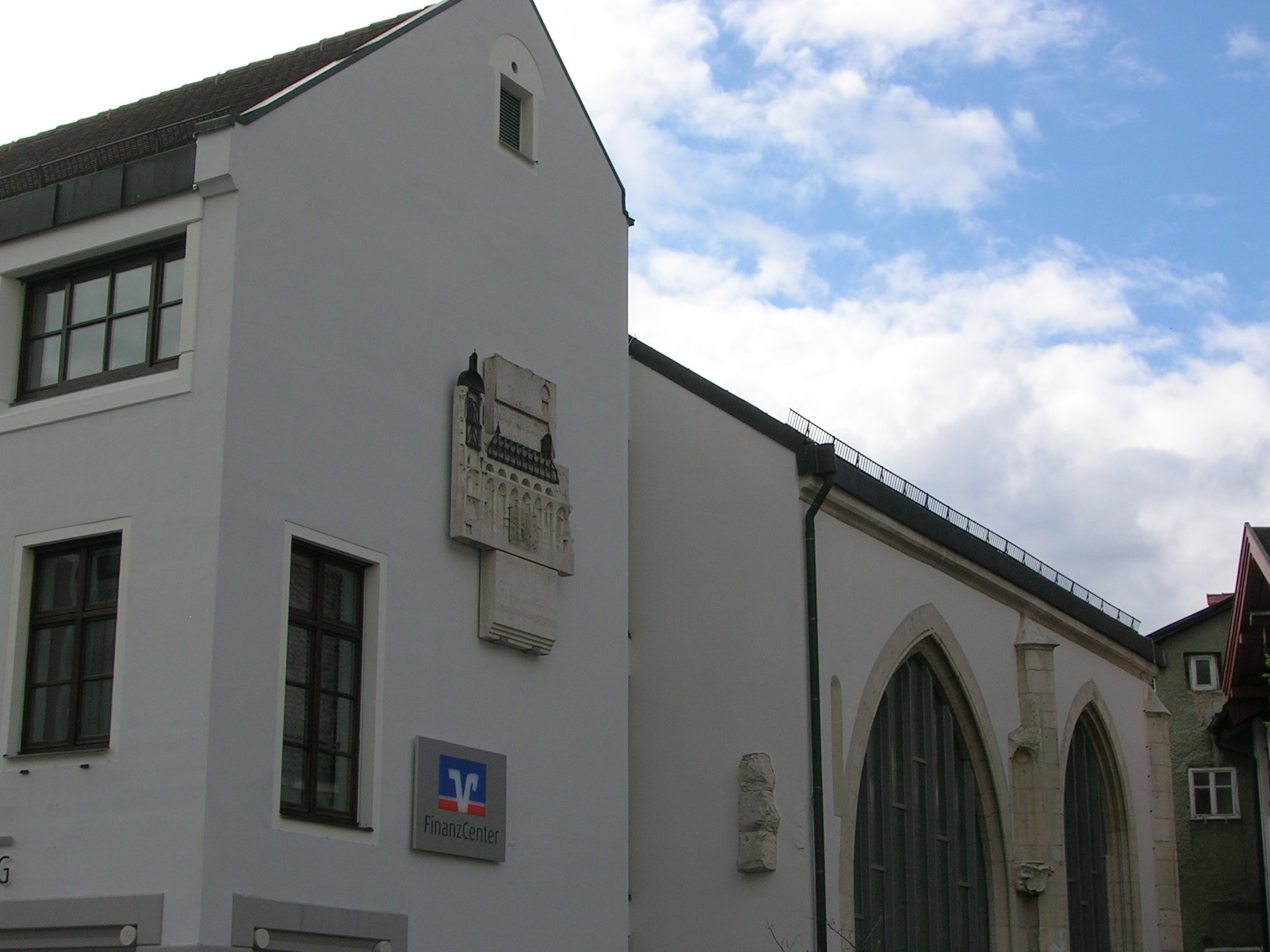 Reste der 1818 abgebrochenen Kollegiatstiftskirche Zu Unser Lieben Frau, verbaut im Haus Marktplatz 7 in Eichstätt